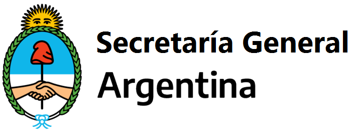 Secretaría General